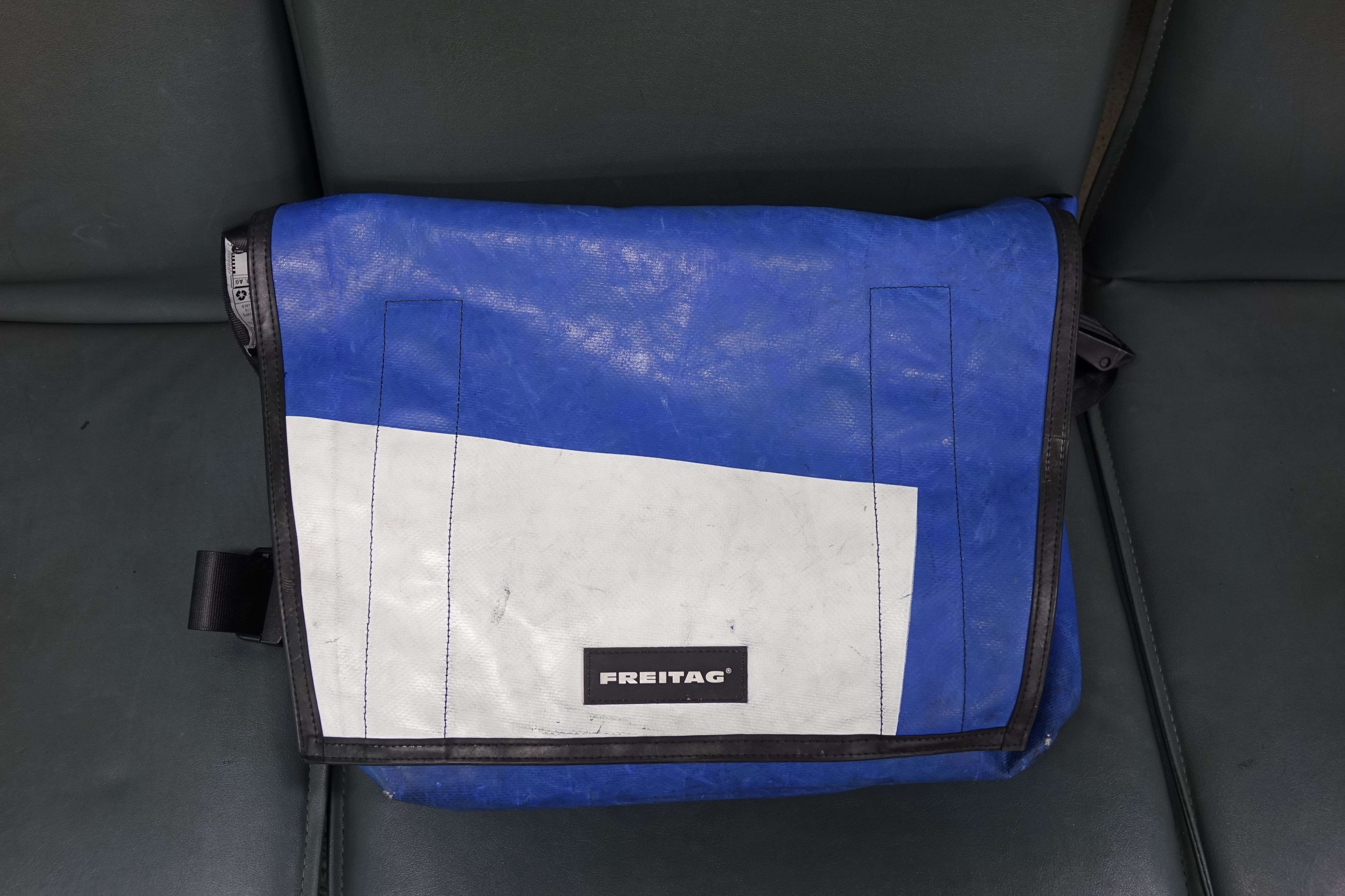 프라이탁 메신져백